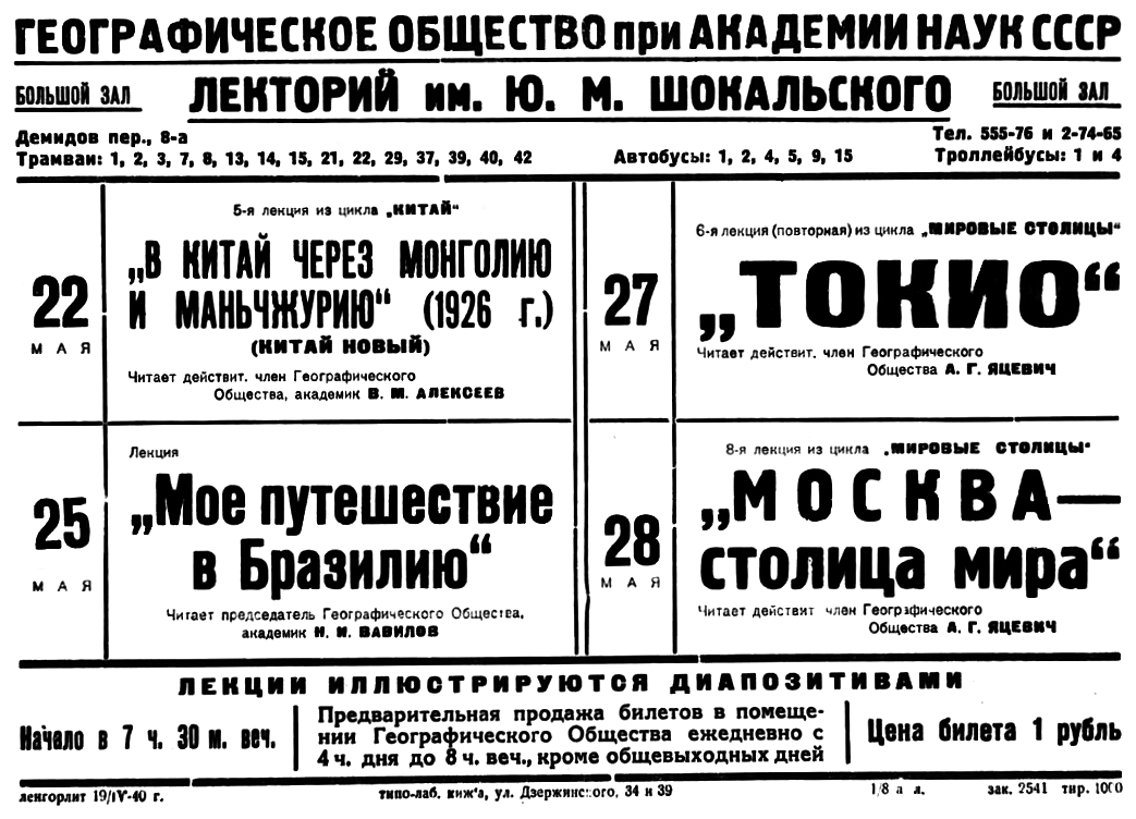 Объявление Географического общества при Академии наук СССР, 1940 года.